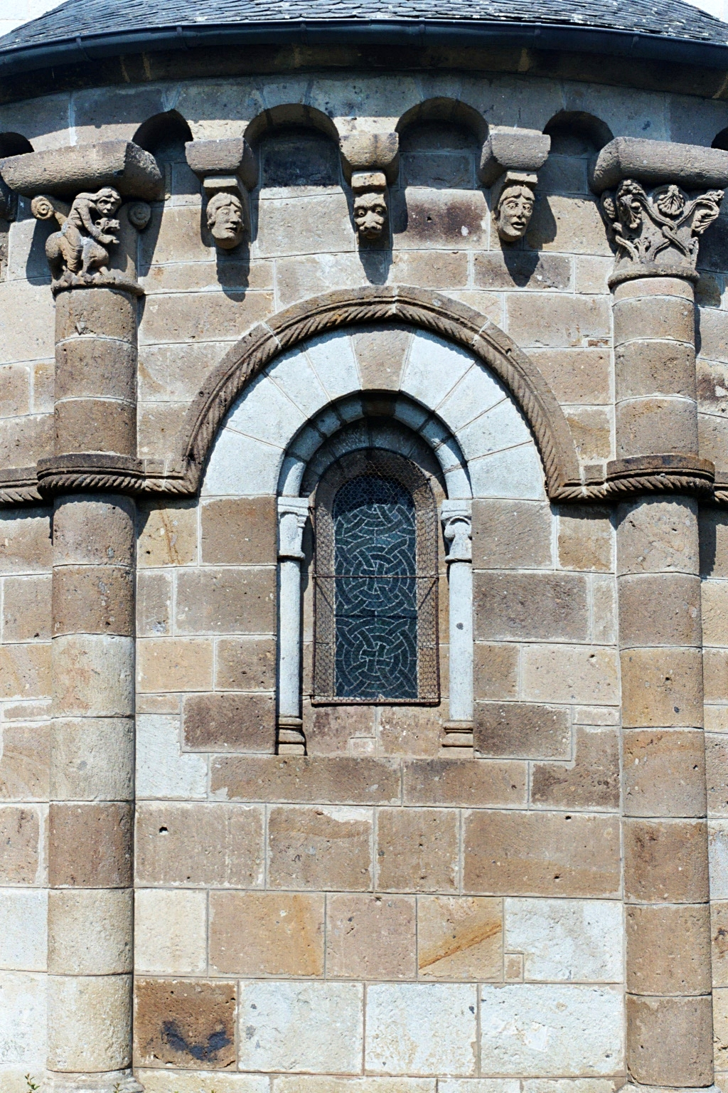 France - Auvergne - Cantal - Église Saint-Georges d'Ydes-Bourg